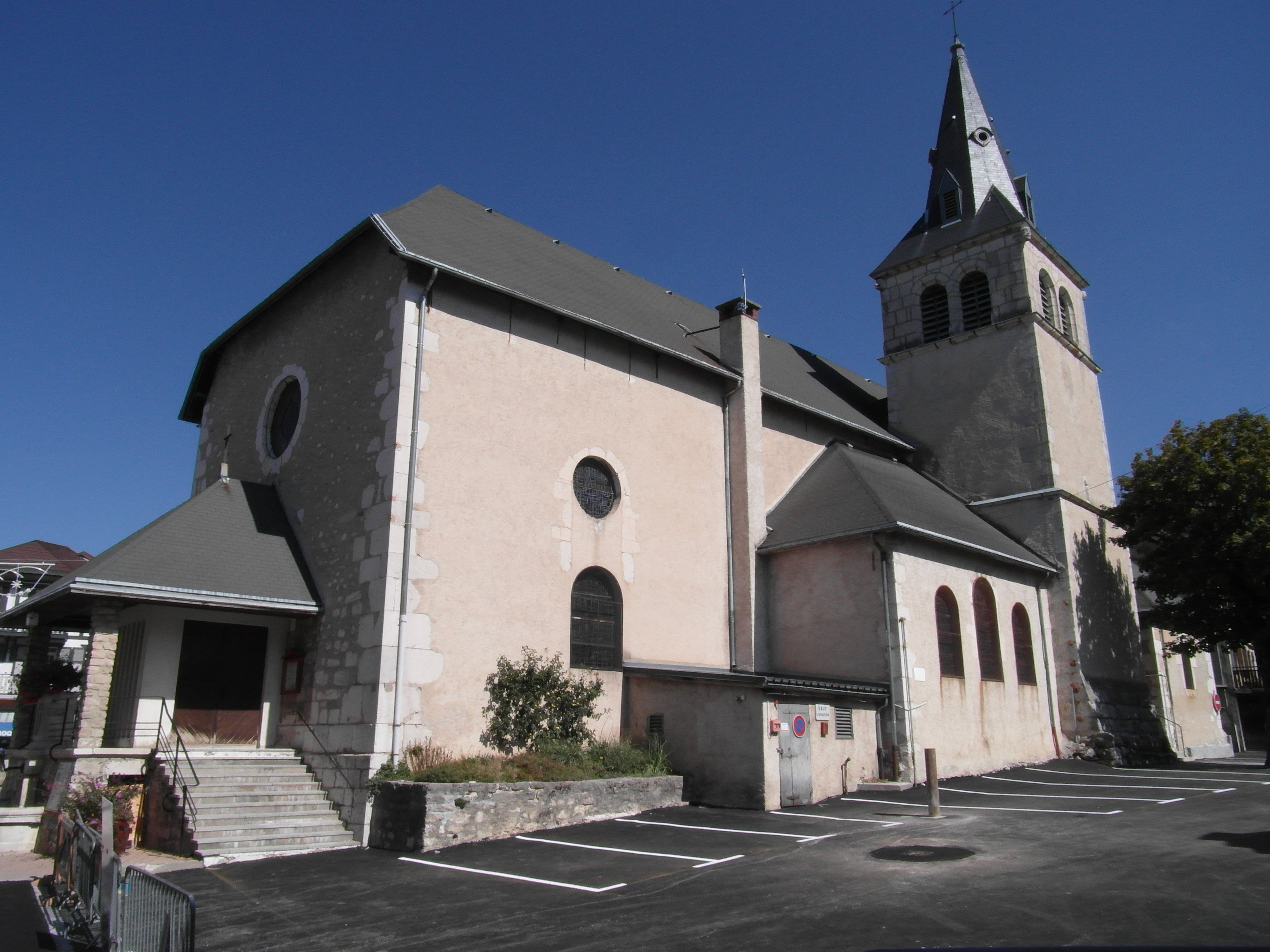 église Saint-Bonnet de Villard-de-Lans